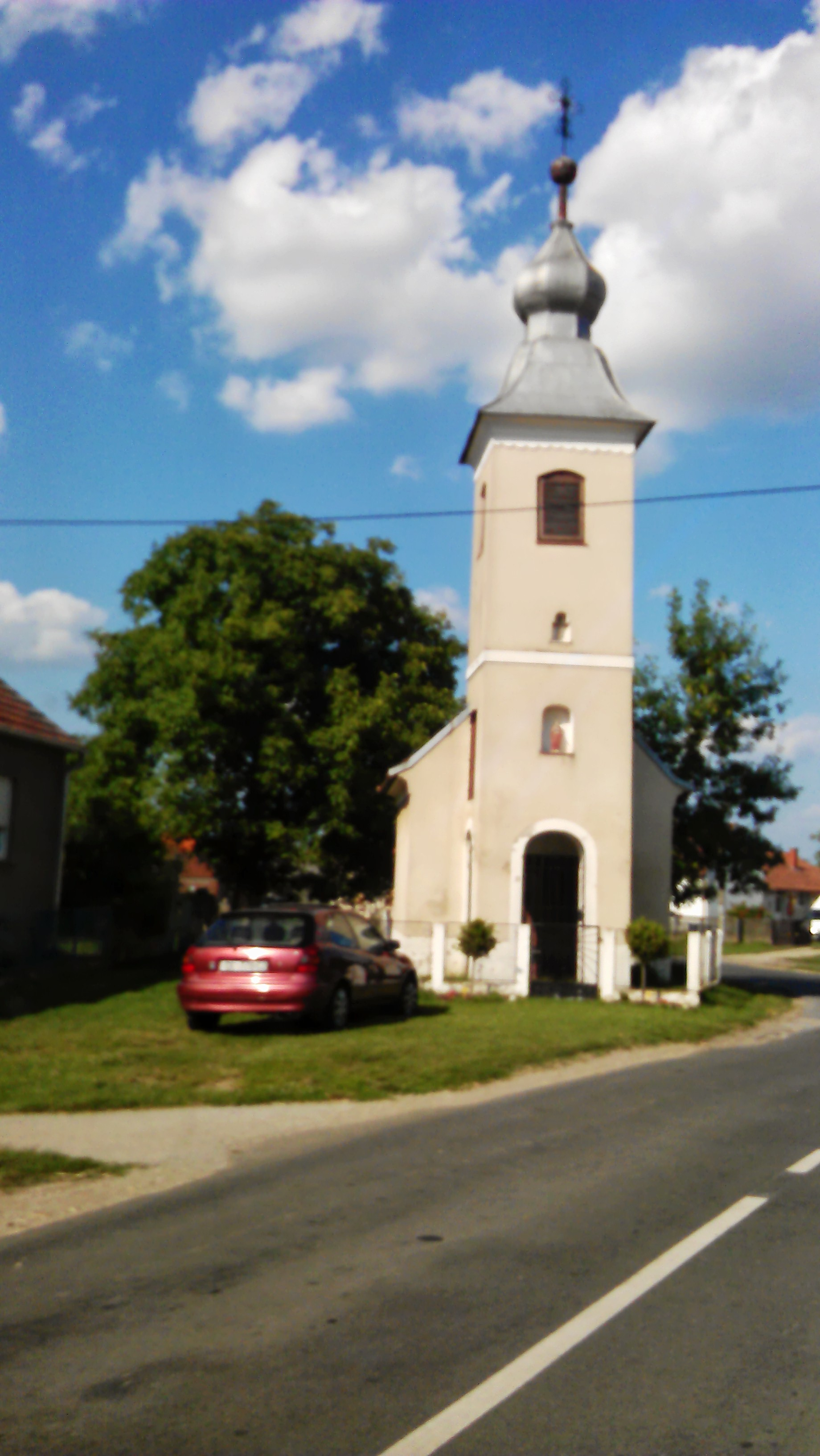 Crkva Kuršanec